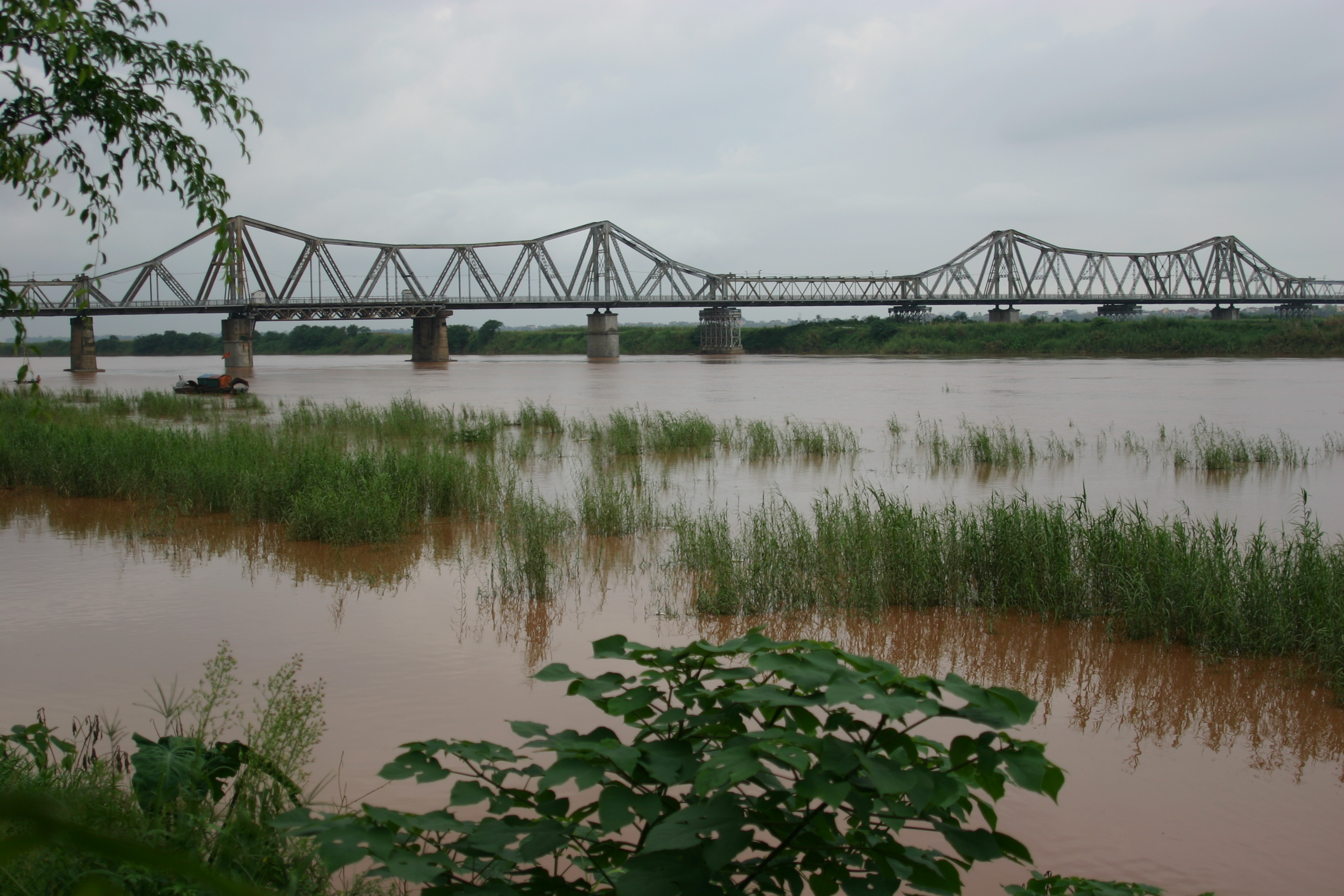 Pont Long Bien , construit dans le style Eiffel à Hanoï, Vietnam. En partie détruit par les bombardements pendant la guerre du Vietnam